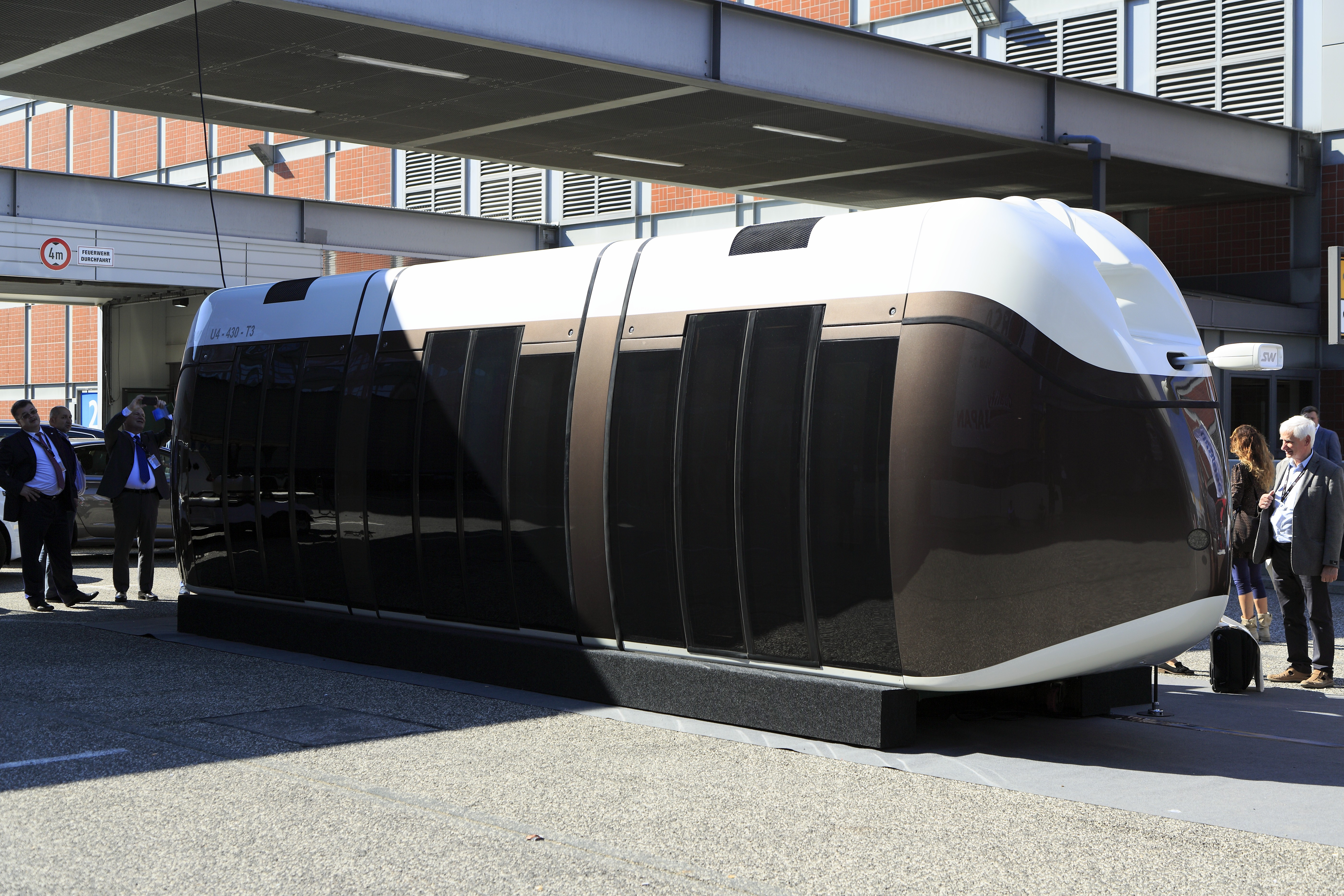 Ein neuer Hängekabinenbahnversuch, im Gegensatz zu den Experimenten in den Sechzigern ist dieses Fahrzeug für höhere Geschwindigkeiten ausgelegt.